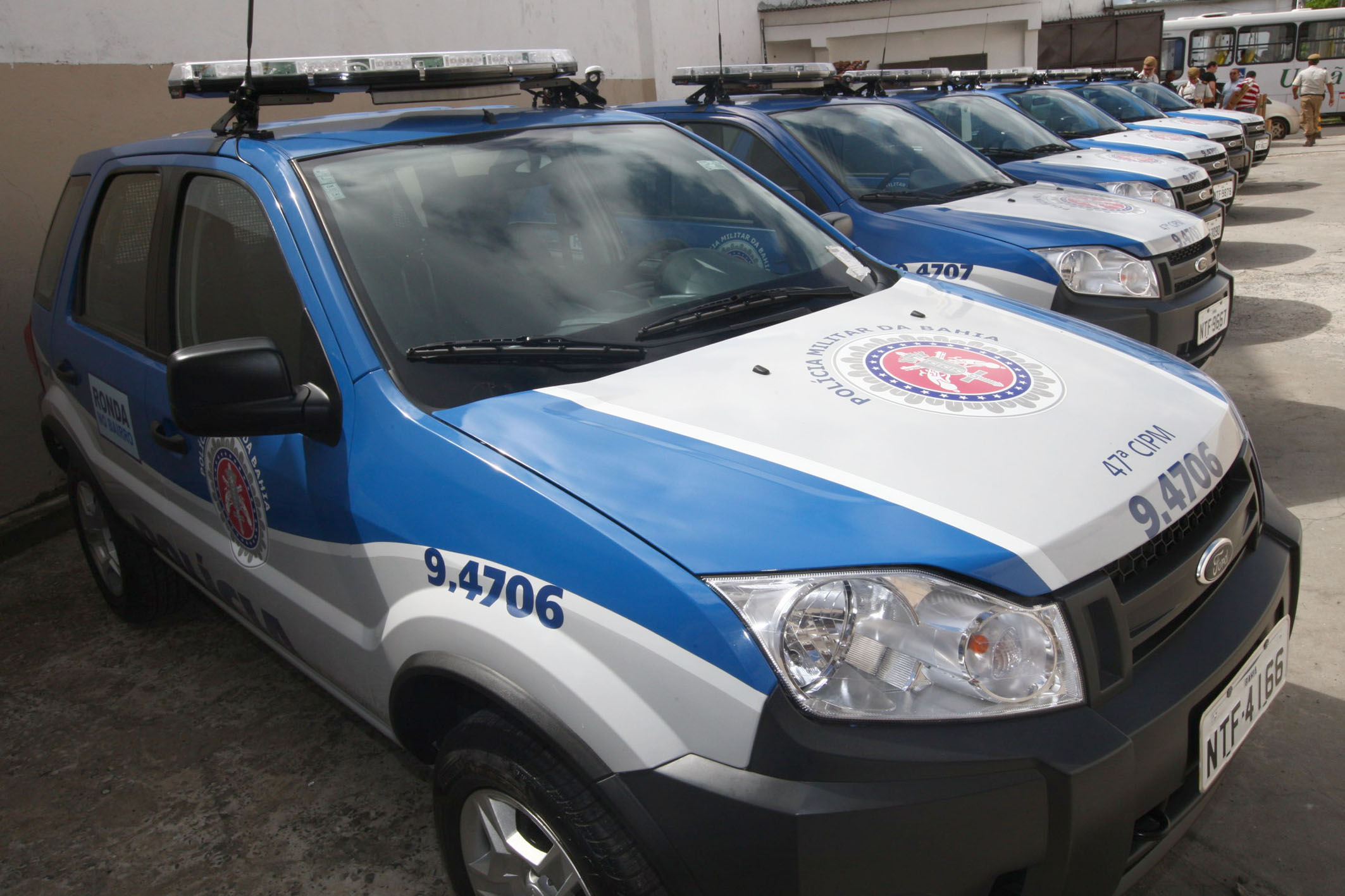 Lançamento da 3ª Etapa do Programa Ronda nos Bairros e entrega de equipamentos para às policia Civil e Militar Foto: Manu Dias/AGECOM